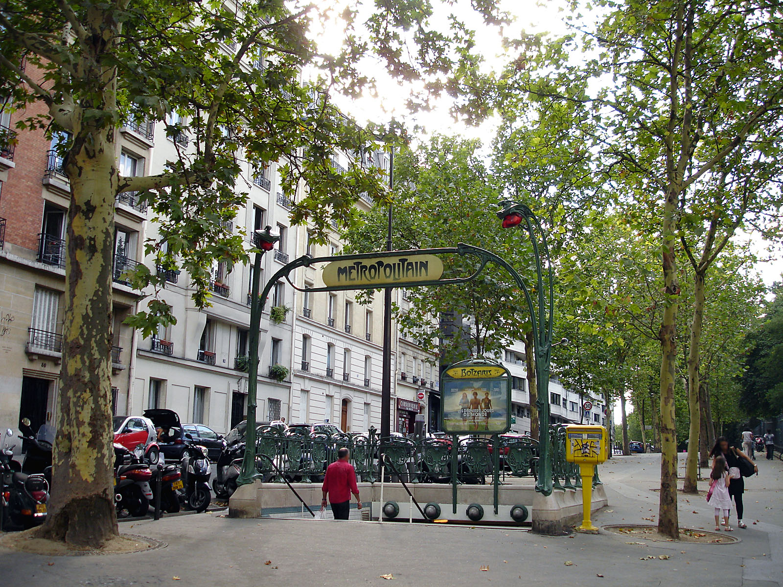 Station Botzaris de la ligne 7 bis du métro de Paris, France.